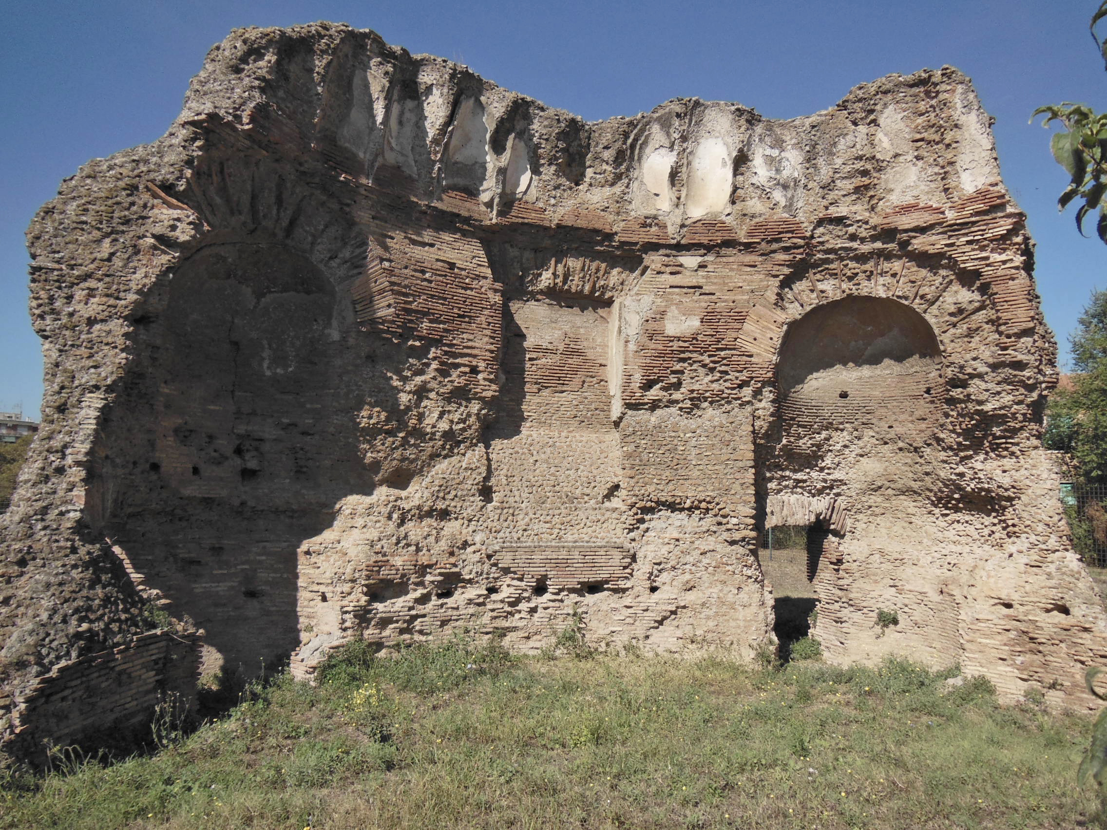 Villa Gordiani, aula absidata This is a photo of a monument which is part of cultural heritage of Italy.